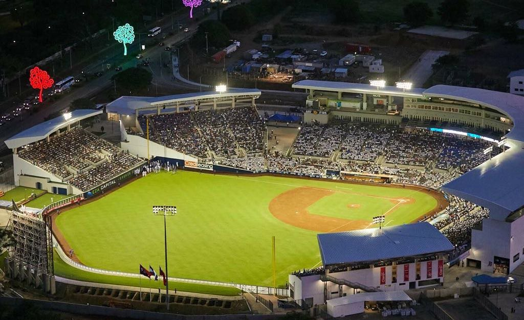 Estadio Nacional Dennis Martinez